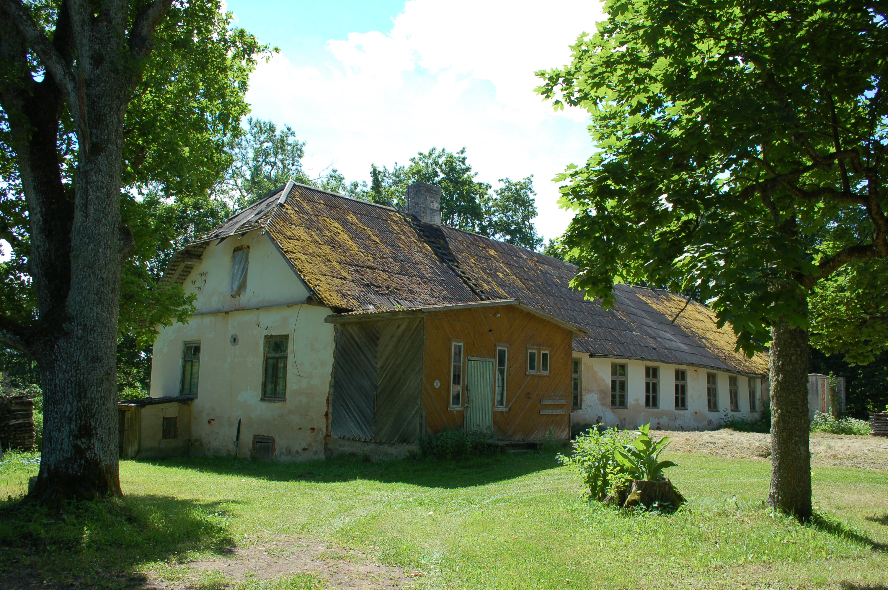 Peahoone esifassaad. Autor: Mart Raudsaar